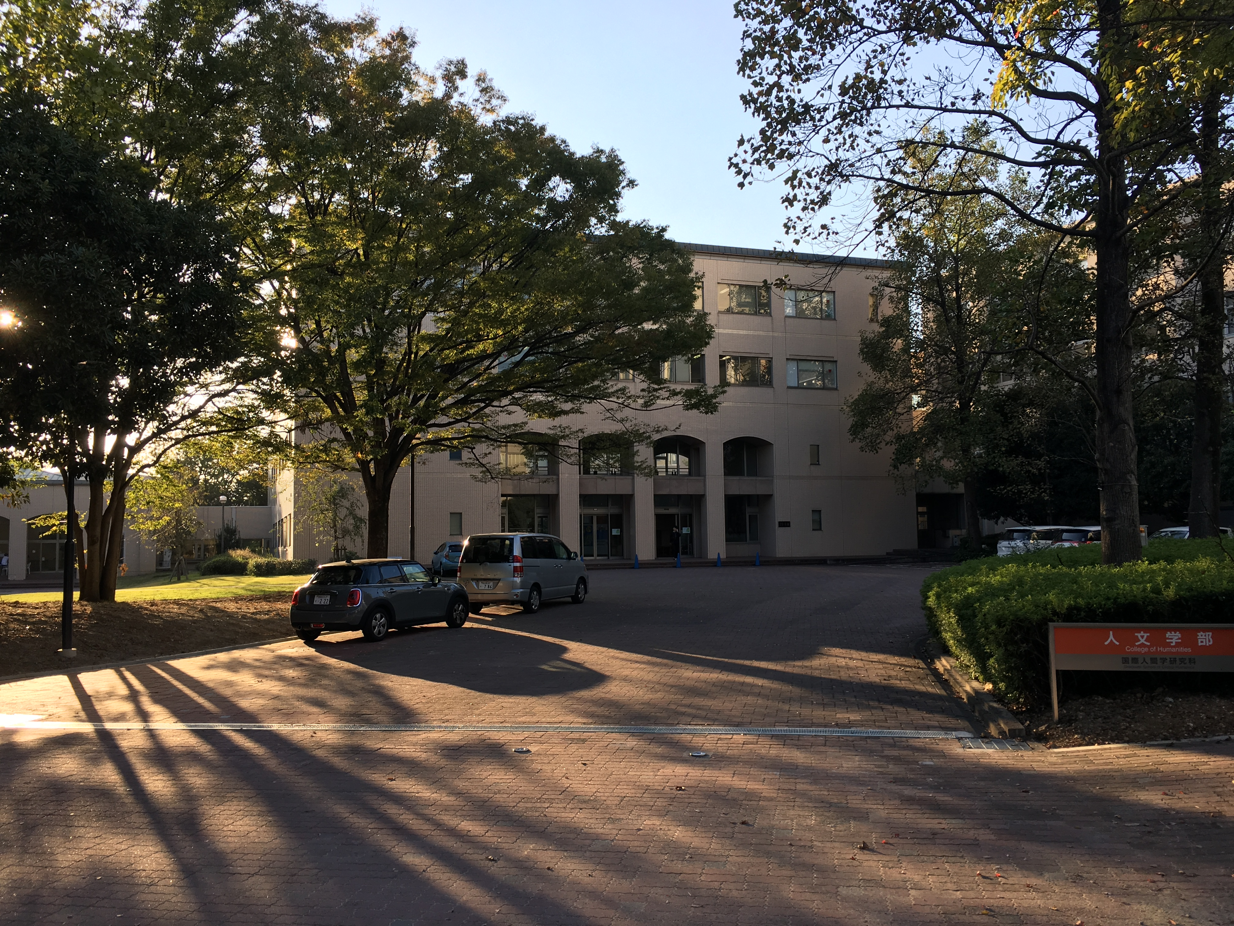 中部大学人文学部棟になります。